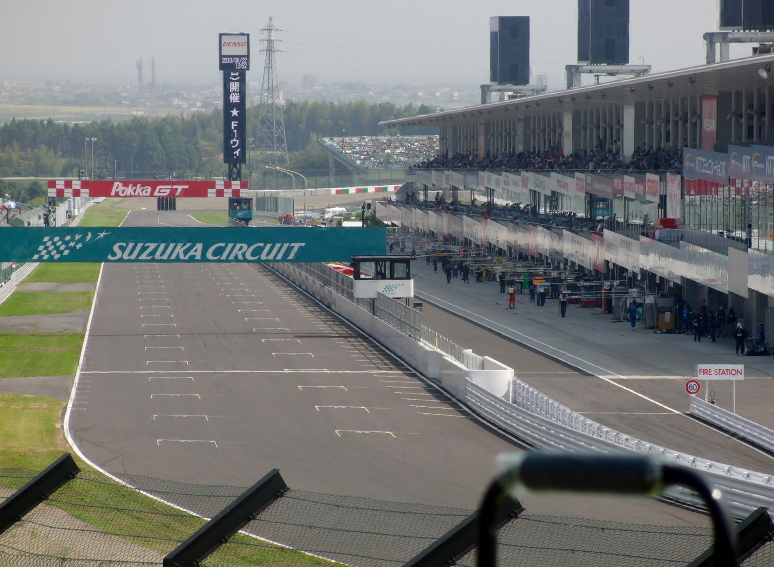 鈴鹿サーキット西ストレートを撮影。